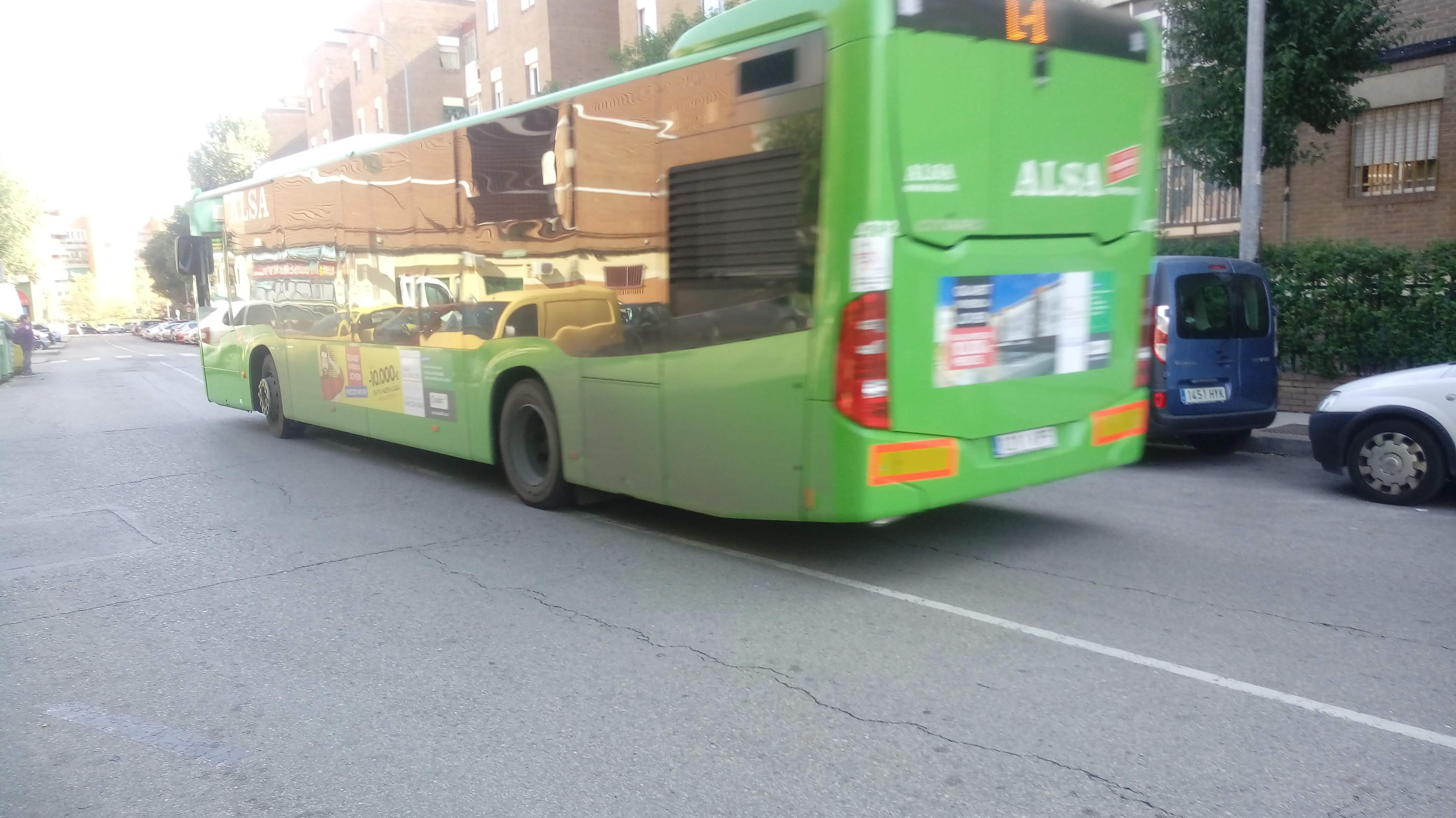 Citaro prestando servicio para la línea 1A de Alsa Torrejón (presta servicio para la línea 5 Circular Parque Europa desde el 15 de noviembre de 2018)